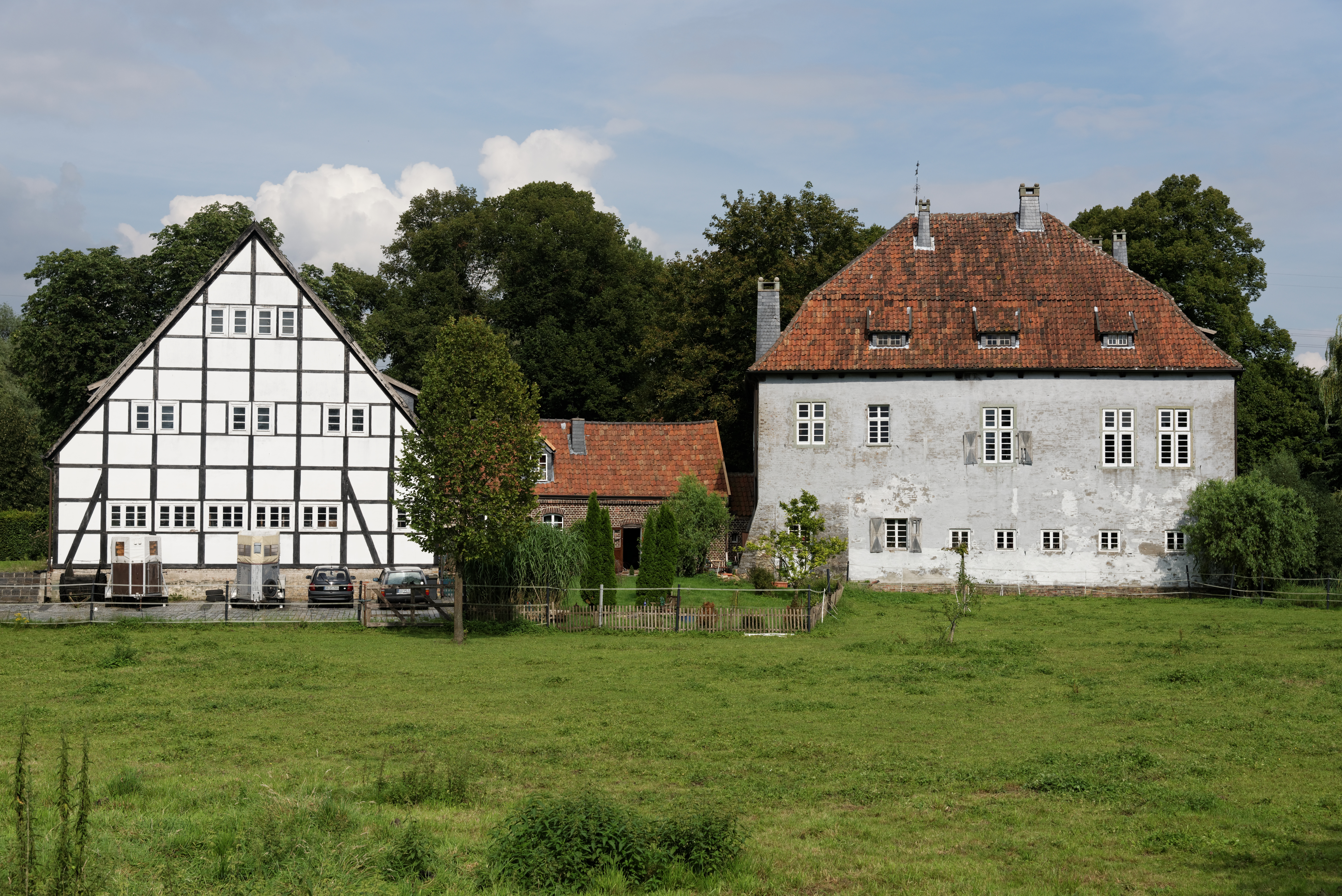 Burg Vellinghausen im Ortsteil Vellinghausen-Eilmsen der Großgemeinde Welver im Kreis Soest in Nordrhein-Westfalen This is a photograph of an architectural monument.